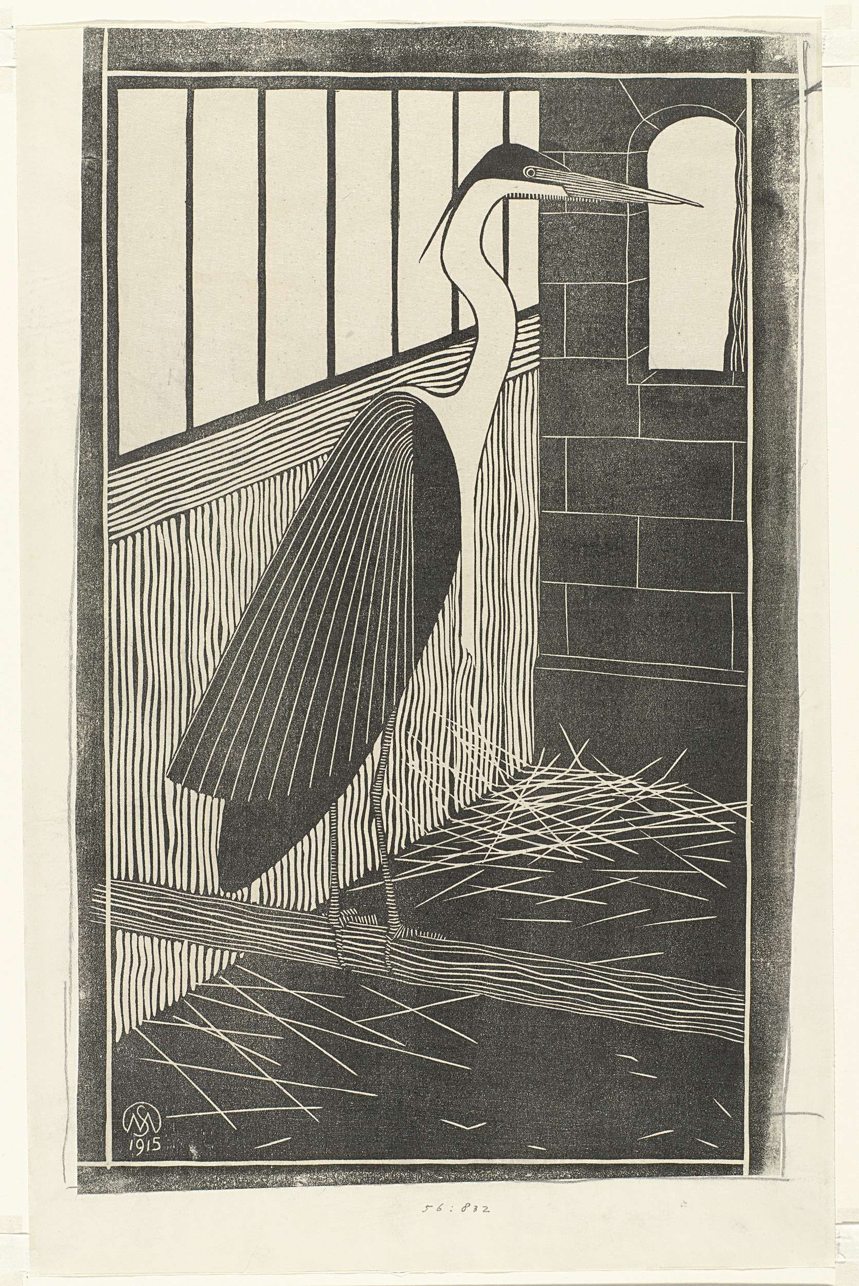 Iconclasscode 25F37(HERON); print